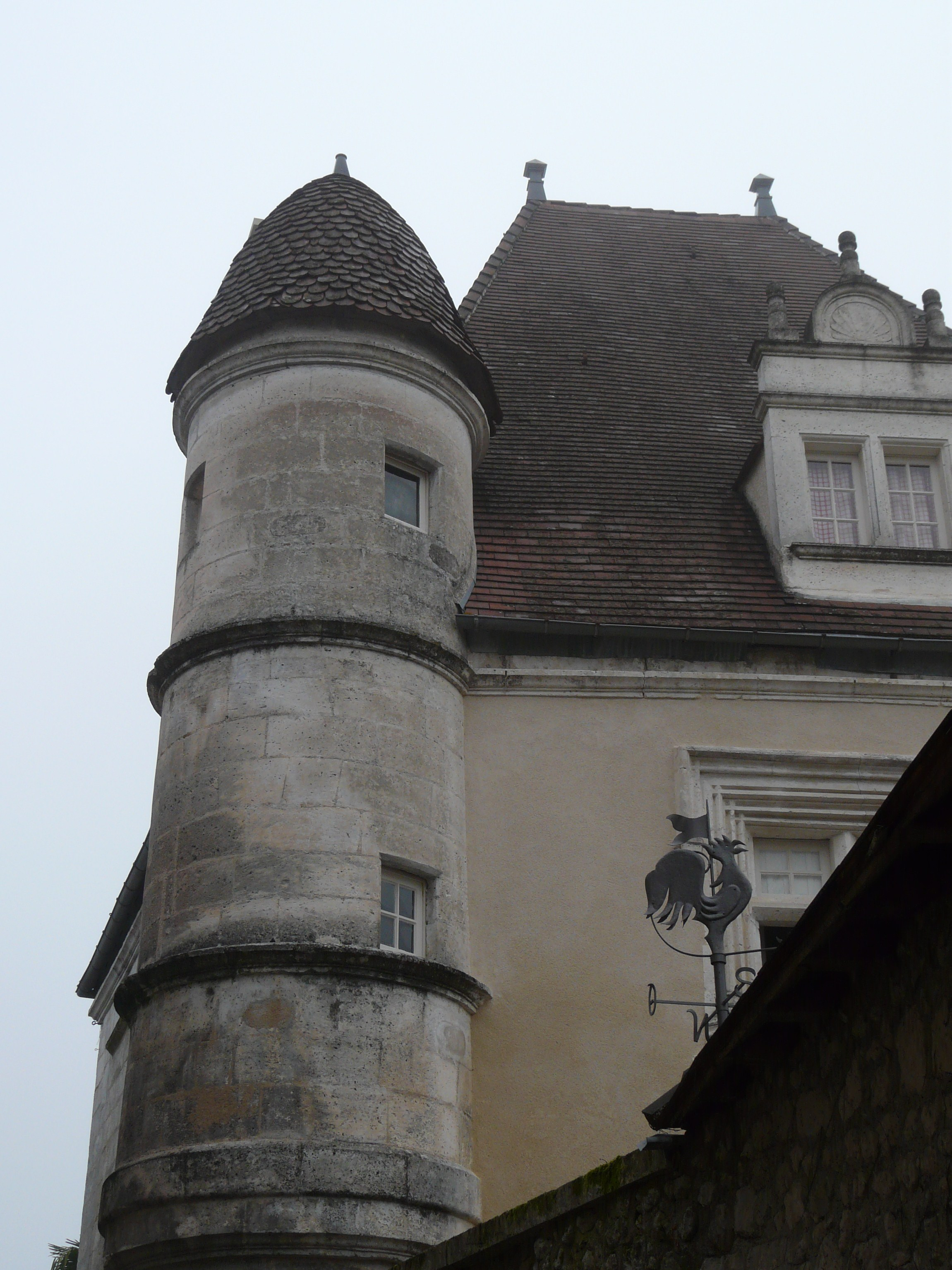 Tourelle du château de Lascoux, Celles, Dordogne, France.